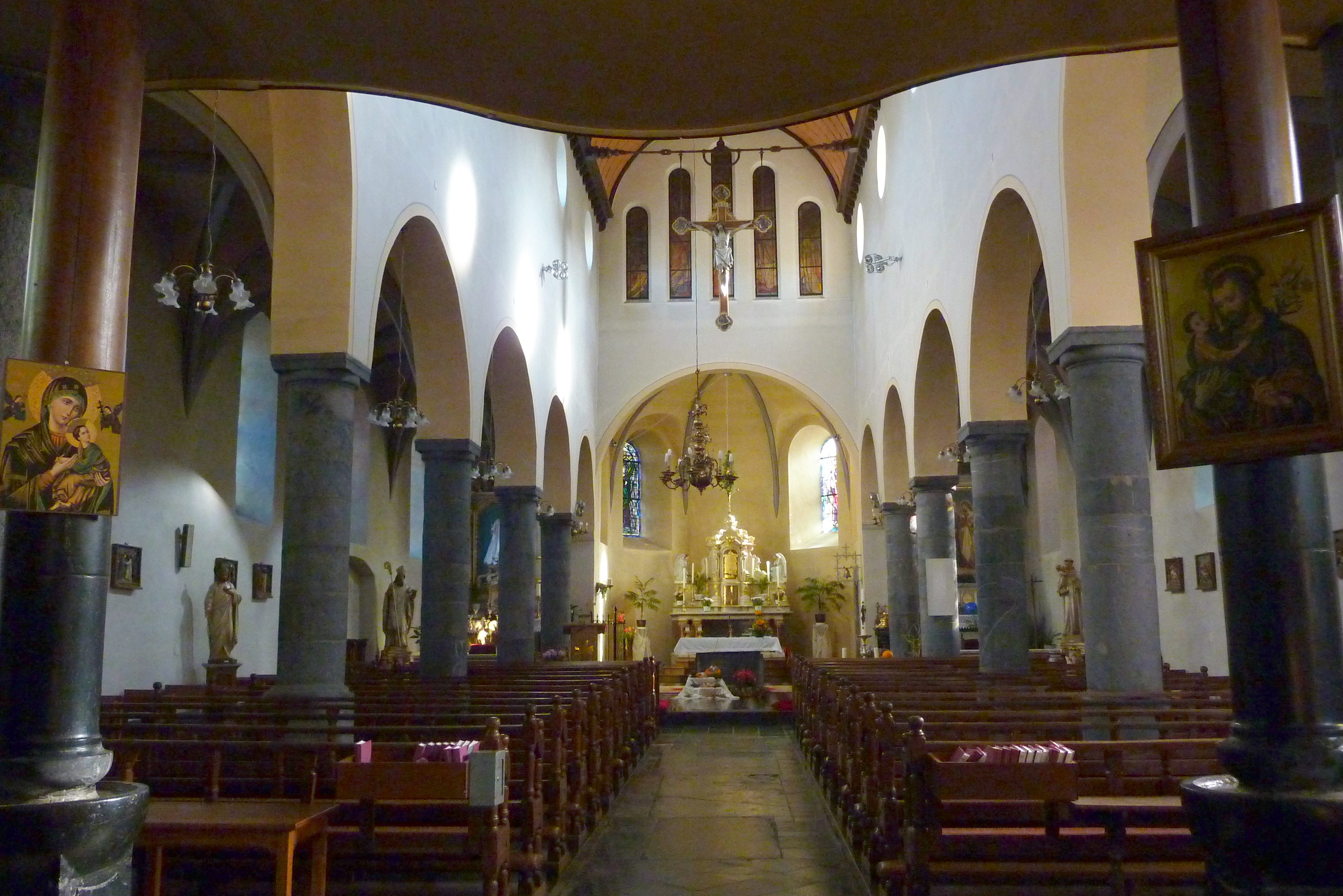 katholische Kirche St. Remy in Moresnet, einem Ortsteil von Plombières in der belgischen Provinz Lüttich